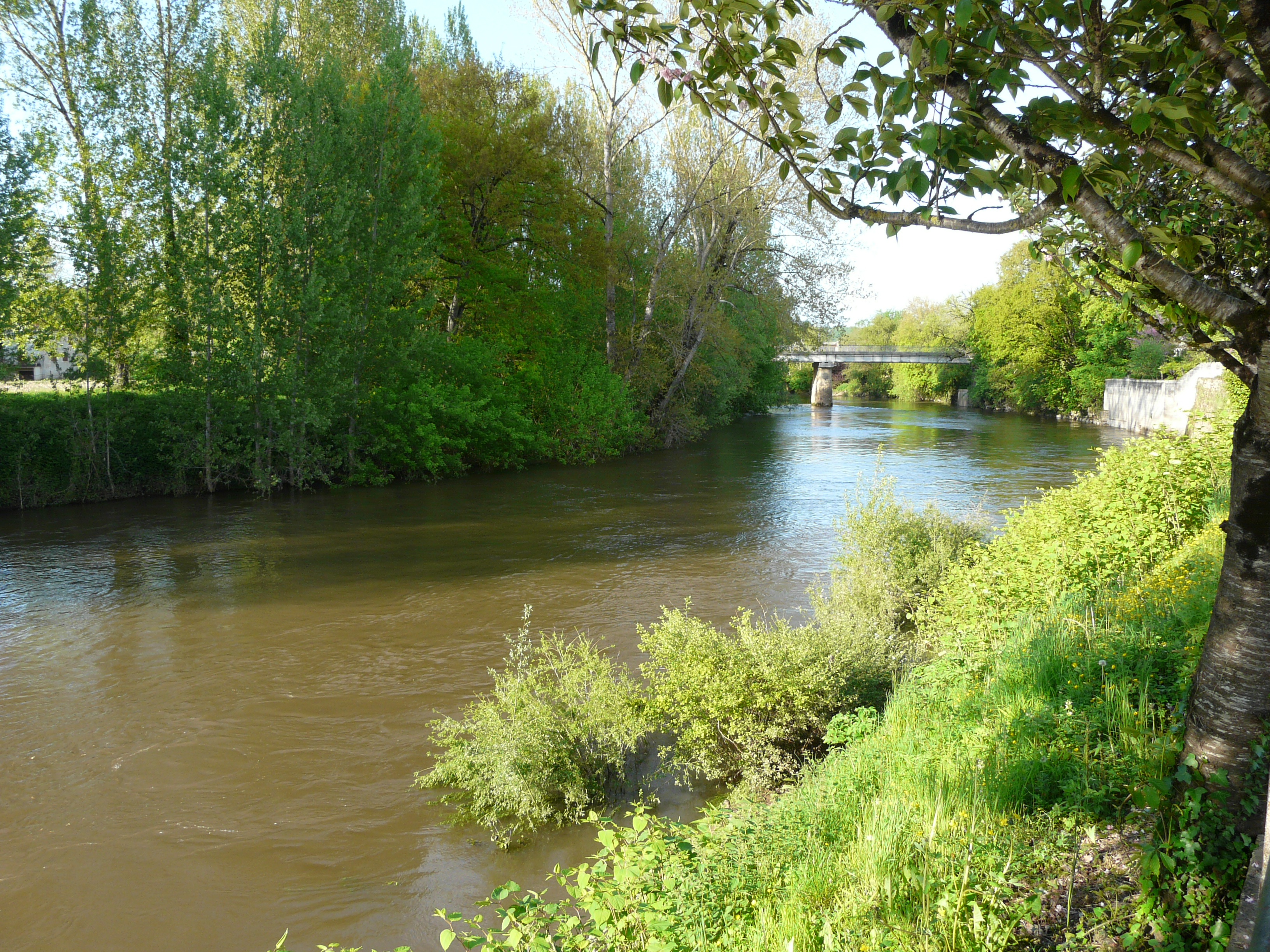 La Vézère à Condat-sur-Vézère, Dordogne, France. Au fond, le pont de la route départementale 62.